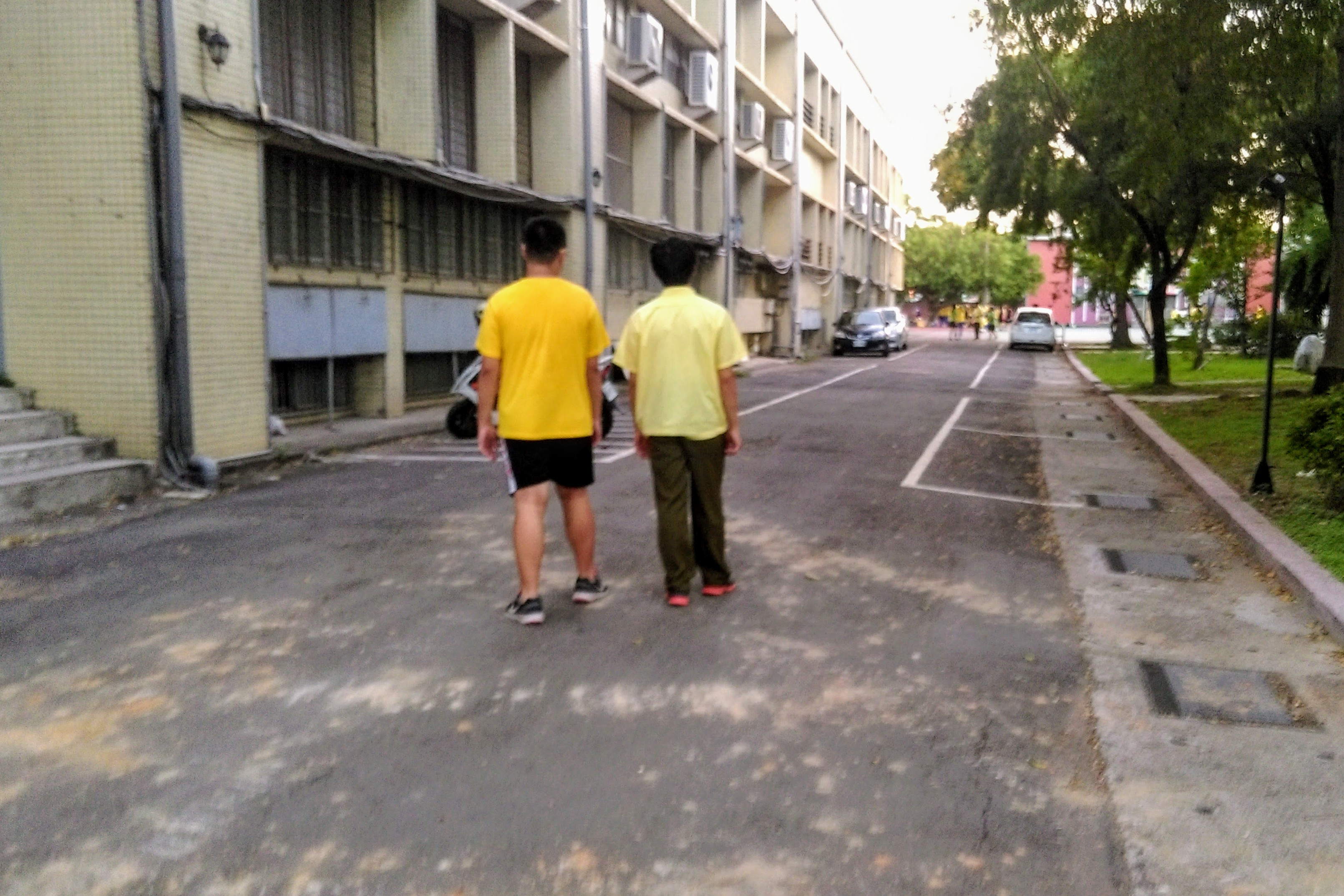 中文（台灣）: 這張片拍攝於志清樓與明道樓之間的車道，可以在圖中看到兩名分別穿著運動服（左）及制服（右）的人。